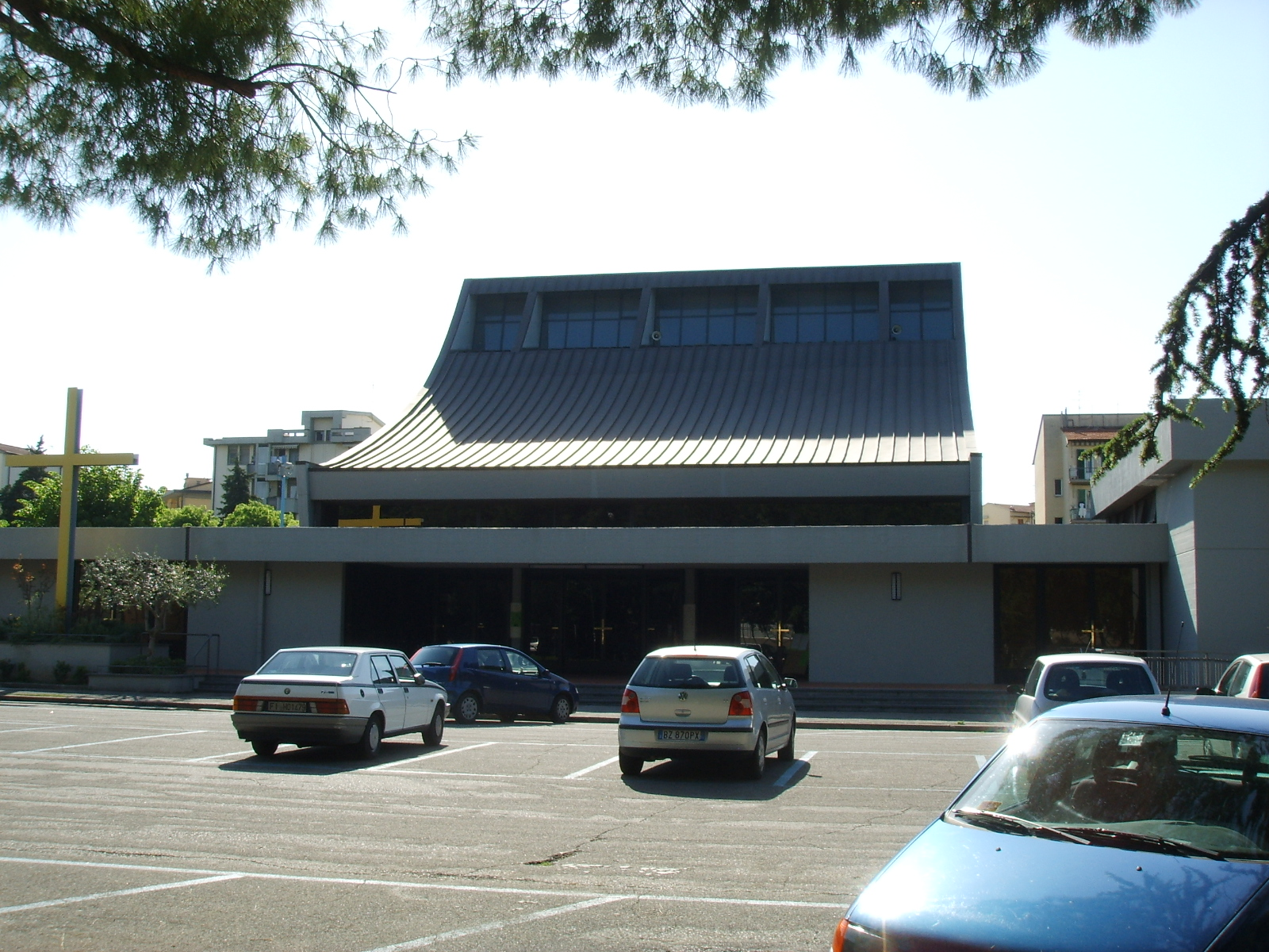 Chiesa del corpus domini firenze